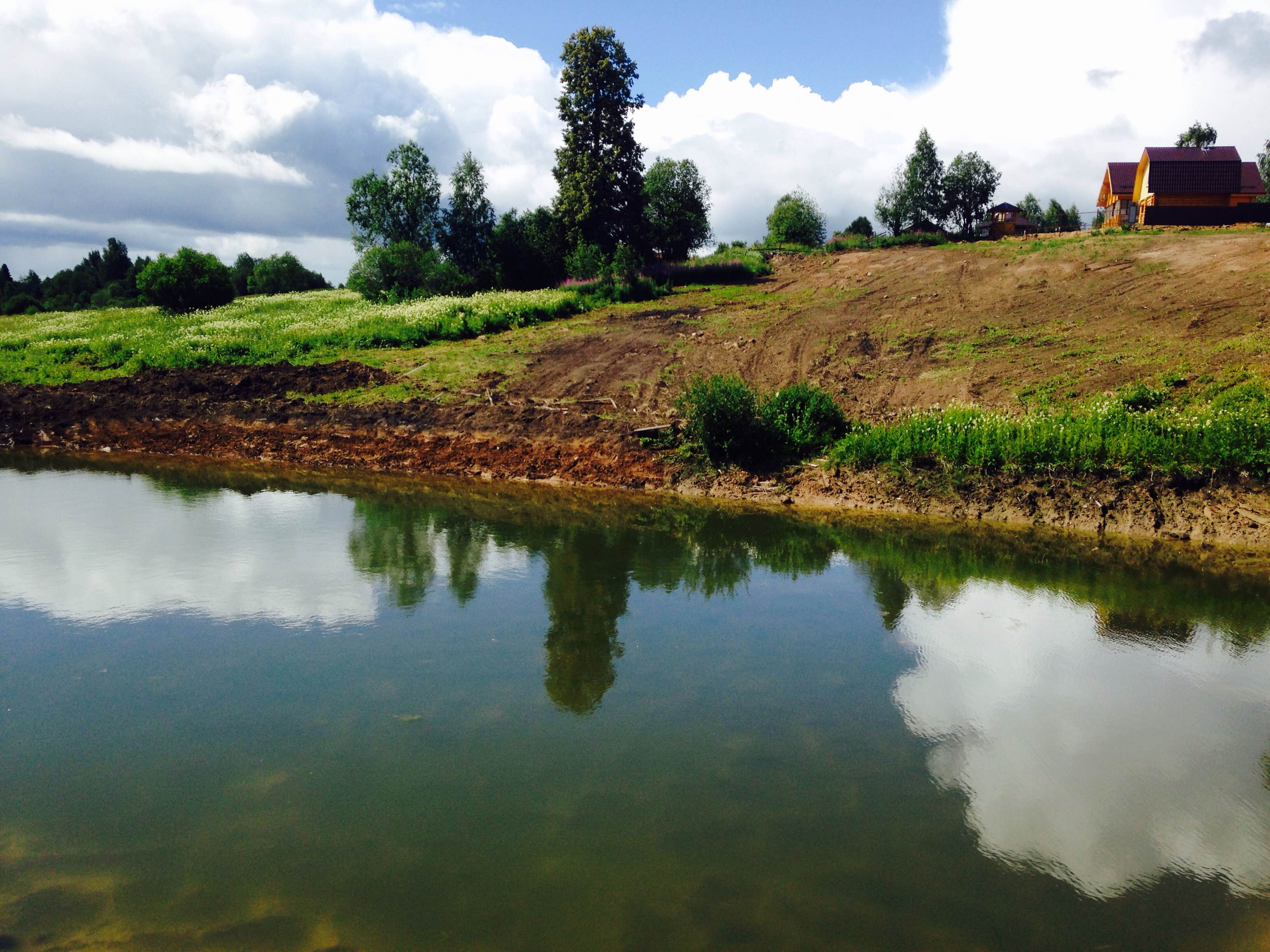 Пруд в деревне Засосенье